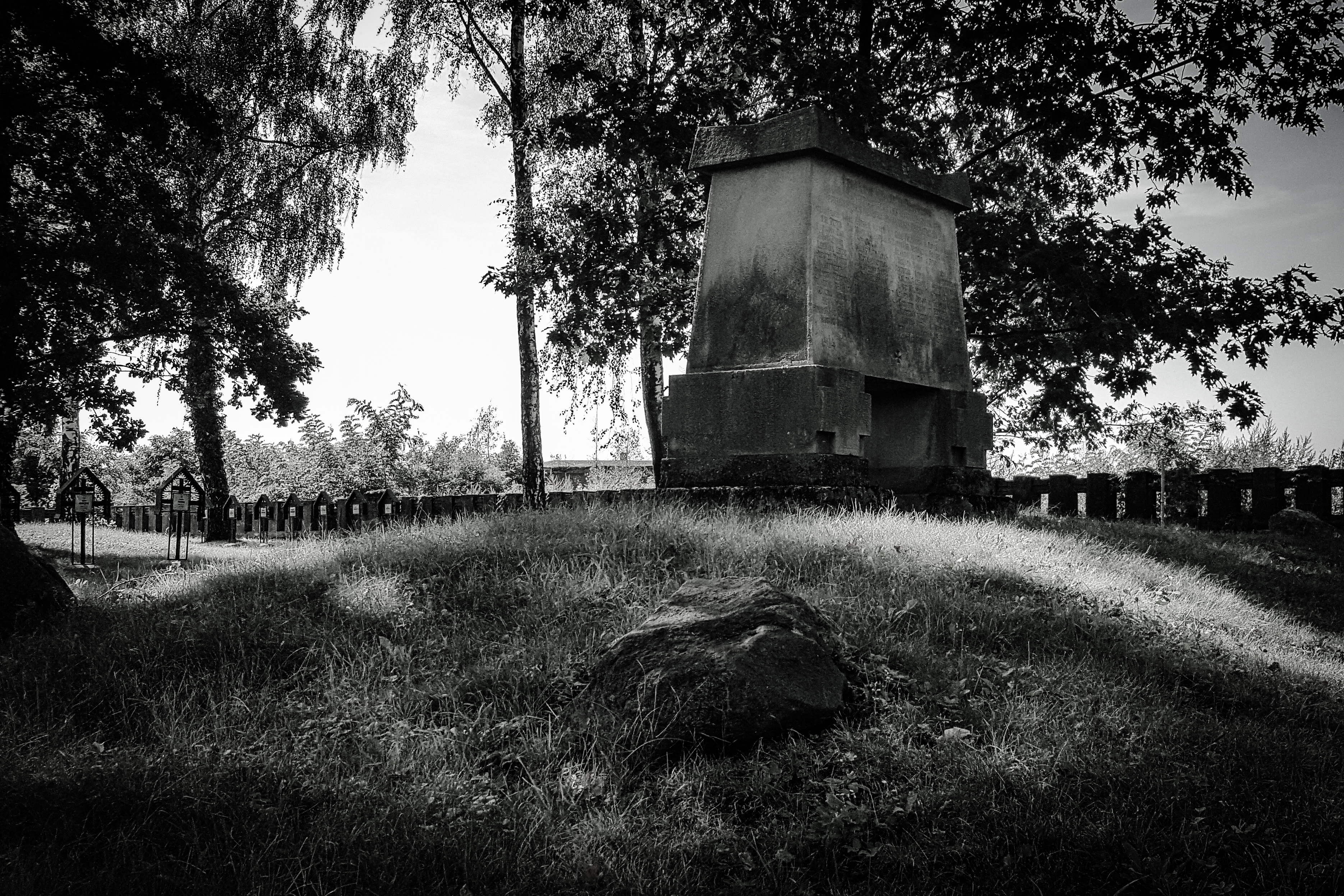 Cmentarz wojenny nr 208 z okresu I wojny światowej w Niedomicach. Zbiorowa mogiła żołnierzy niemieckich